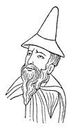 Judenhut.